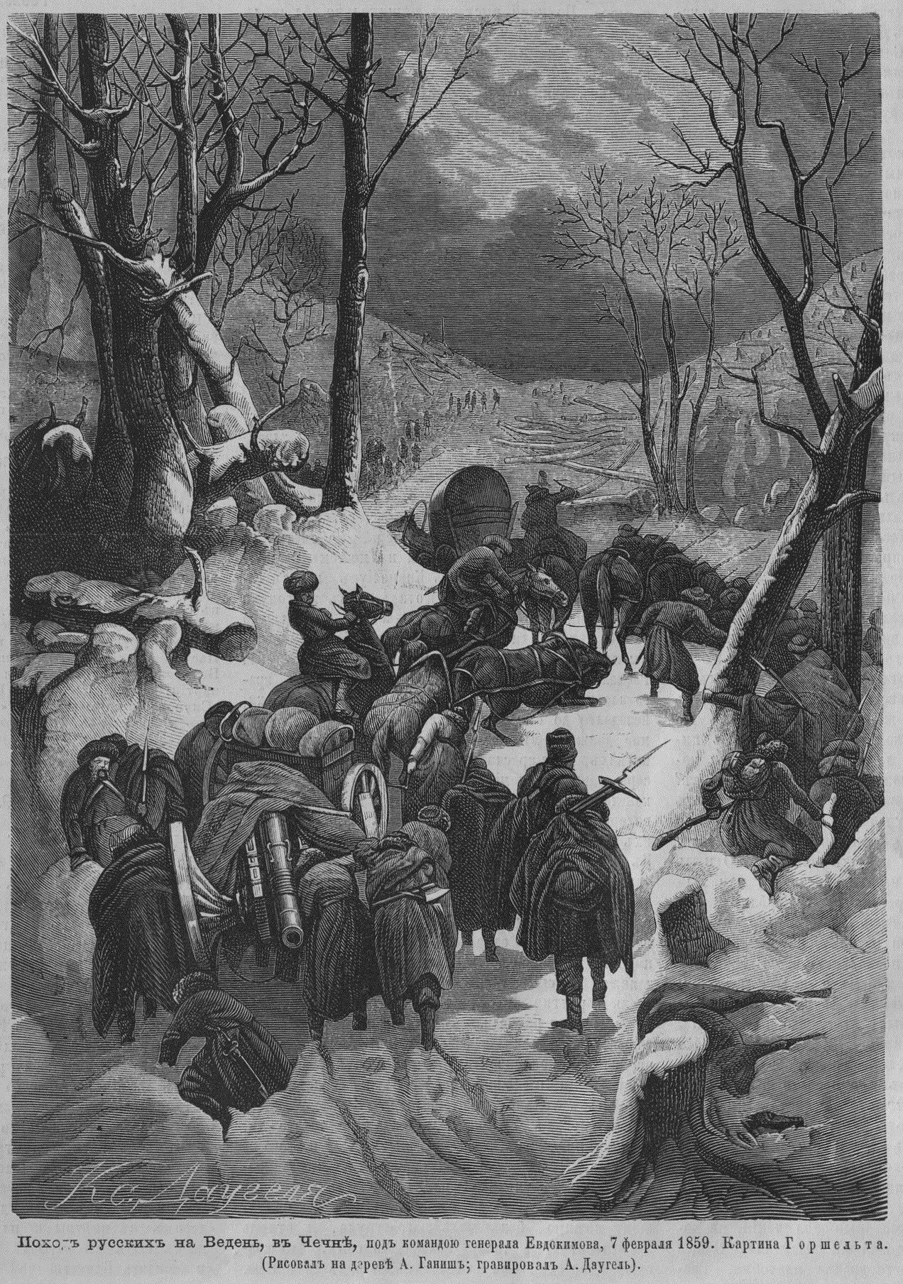 Движение царского отряда через горы к аулу Ведено в феврале 1859.